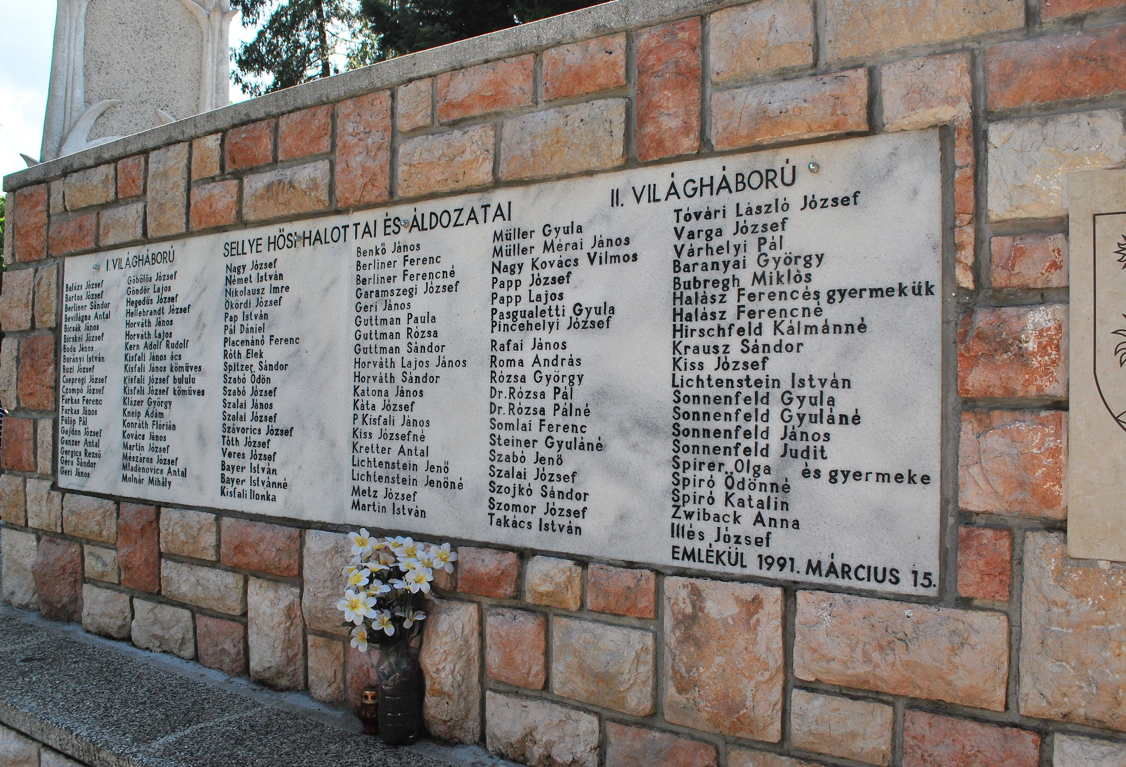 A sellyei világháborús emlékmű névsora, Köztársaság tér